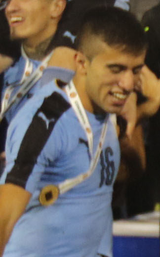 Quito 11 Feb (Andes).- Festejos y celebraciones por el triunfo del campeonato sudamericano de fútbol sub 20. La celeste uruguaya festejó la victoria del campeonato con gran emotividad. Fotografías: Carlos Rodríguez/Andes.